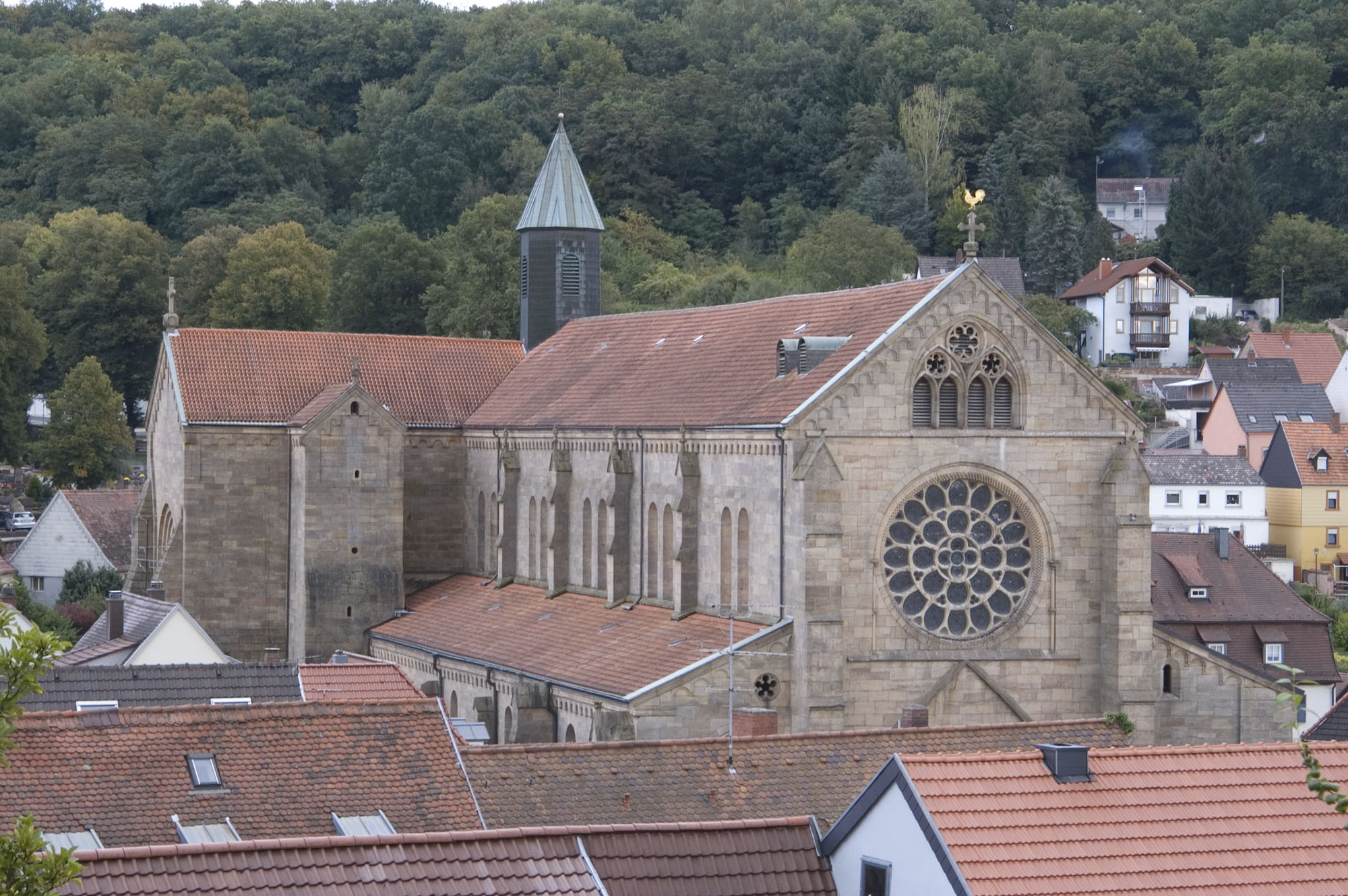 Kirchstraße 3: Simultanpfarrkirche Mariä Himmelfahrt; ehemalige Zisterzienserklosterkirche, spätromanische kreuzförmige Pfeilerbasilika, 1168 bis 1254